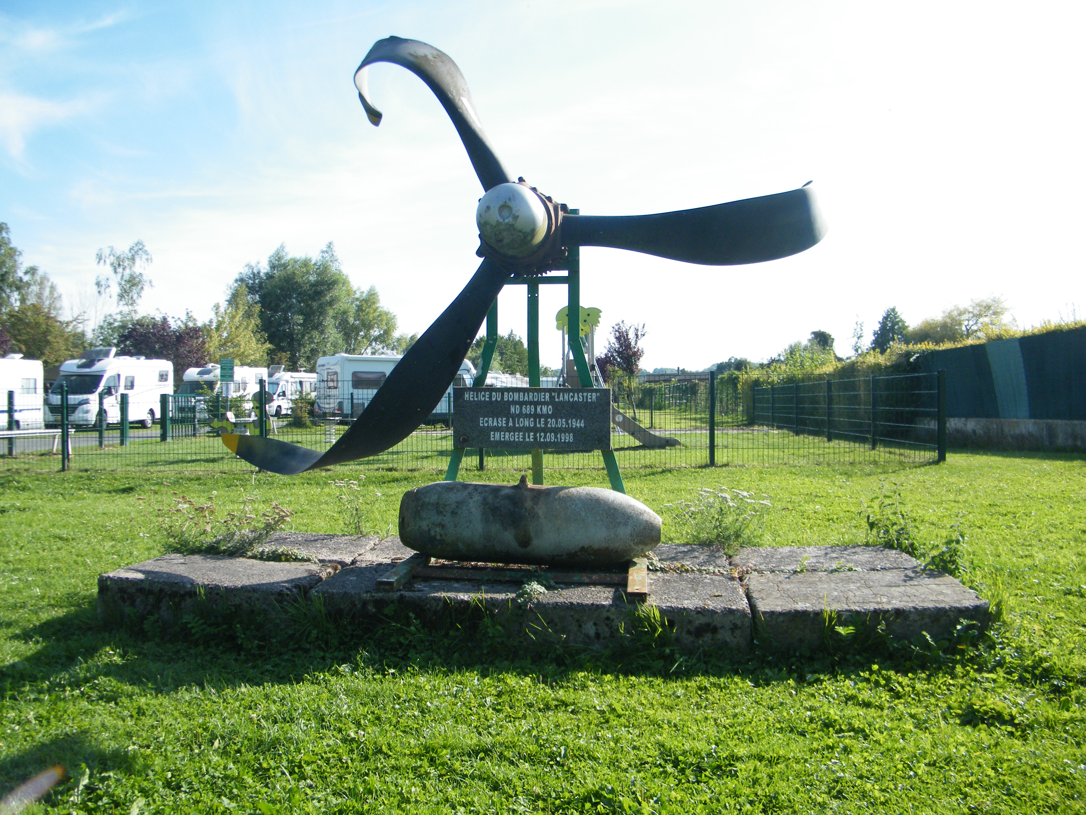 Long, Somme, Fr, hélice du crash du 20-05-1944 (Lancaster).